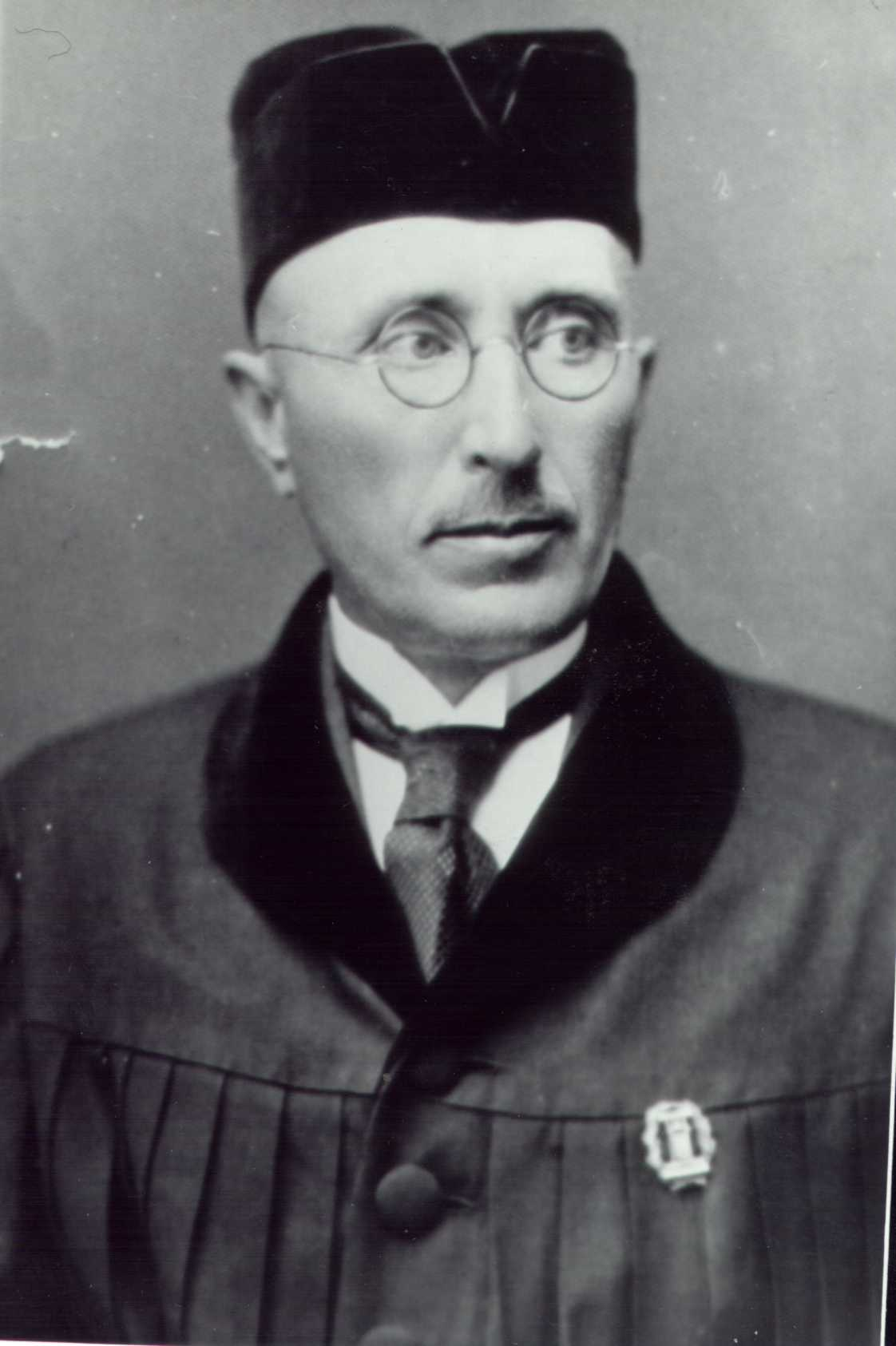 Jan Wierzbicki, łot. Jānis Veržbickis (ur. 18 kwietnia 1888 we wsi Eversmuiža k. Lucynu, zm. 1946 w Dyneburgu), polski prawnik i działacz polonijny na Łotwie, poseł na Sejm w latach 1922-34, wiceminister spraw wewnętrznych Republiki Łotewskiej